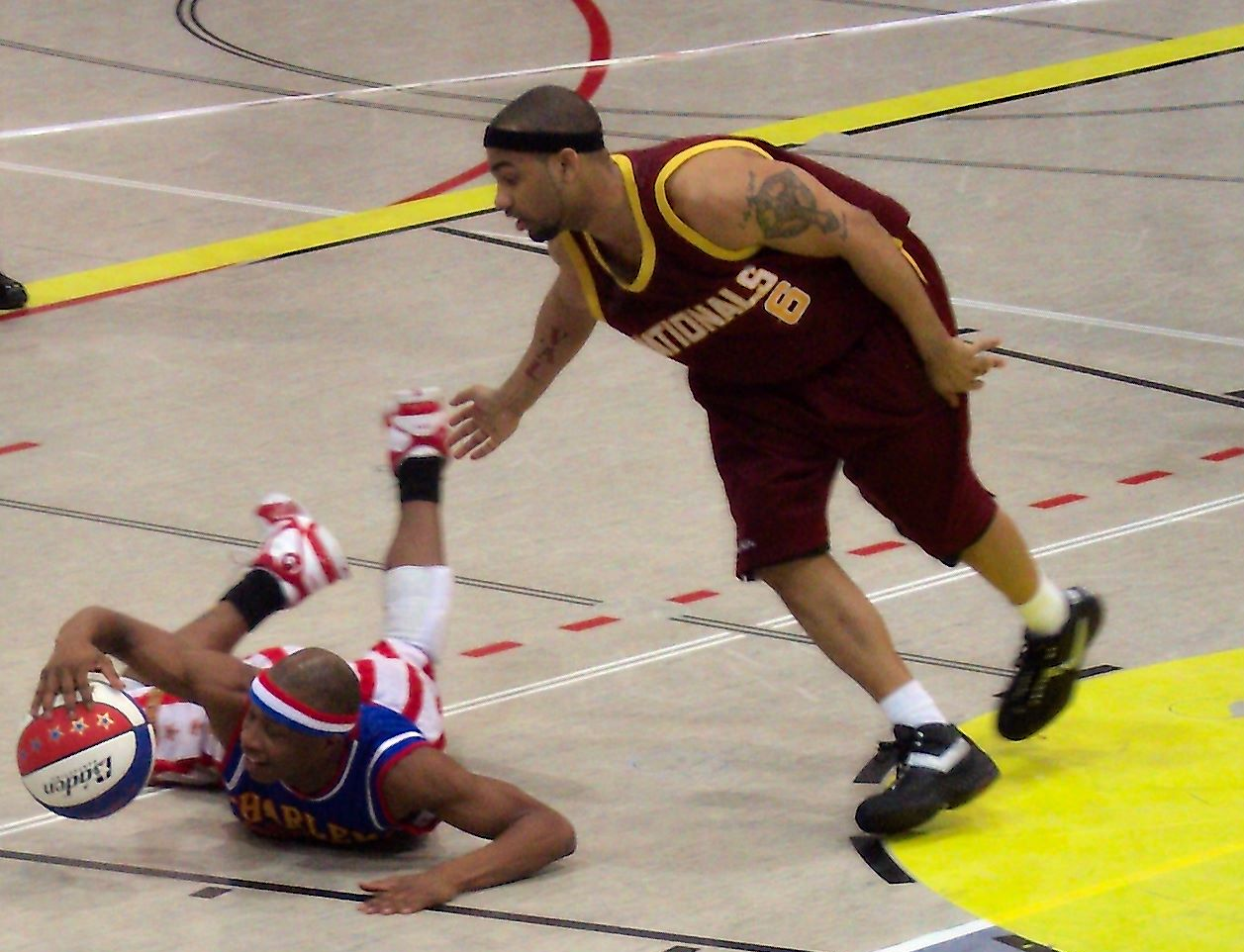 Harlem Globetrotters, during a game in Salzburg 29.03.2007